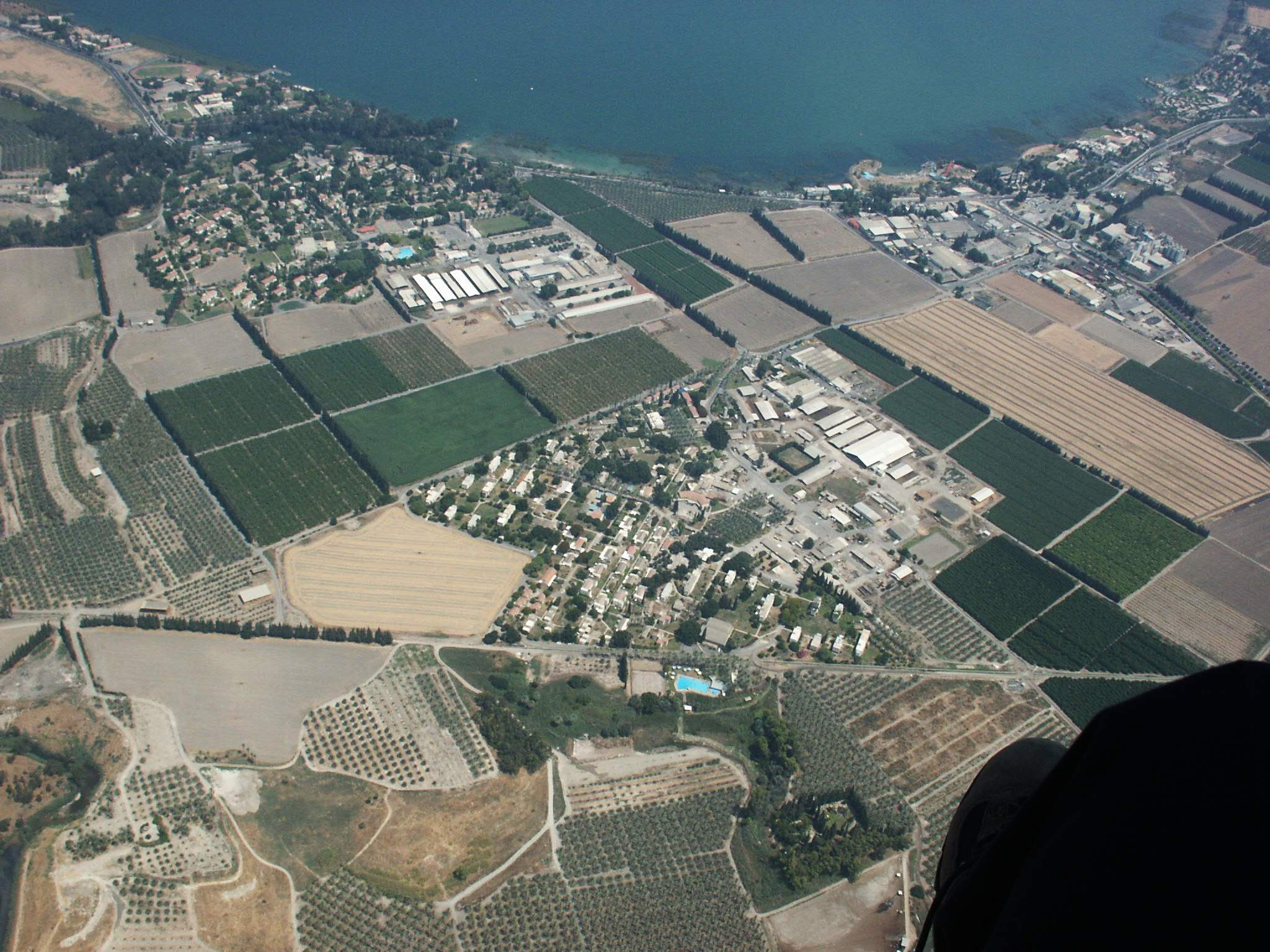 Deganya Alef and Deganya Bet